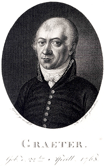 Portrait von Friedrich David Gräter, Kupferstich aus dem 19. Jahrhundert nach Georg Peter Groß